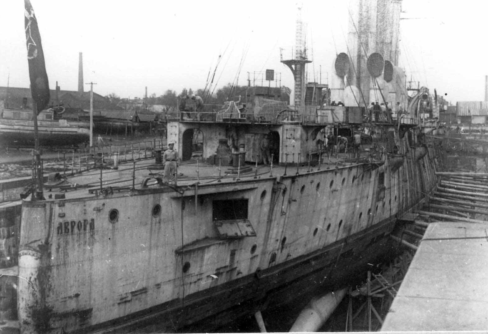 Аврора в ходе восстановительных работ